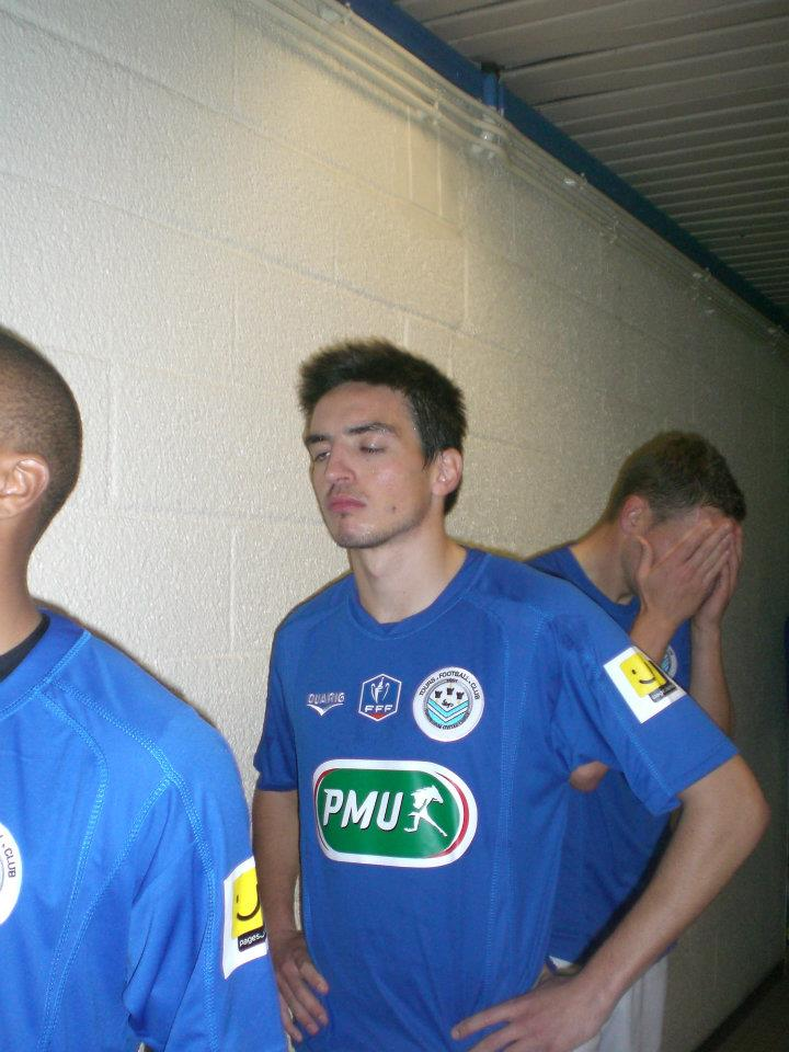 Léo Schwechlen avant le début du match Avion / Tours - septième tour de la Coupe de France de Football à Avion le 19 novembre 2011